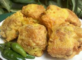 Basa Jawa: Tahu Isi